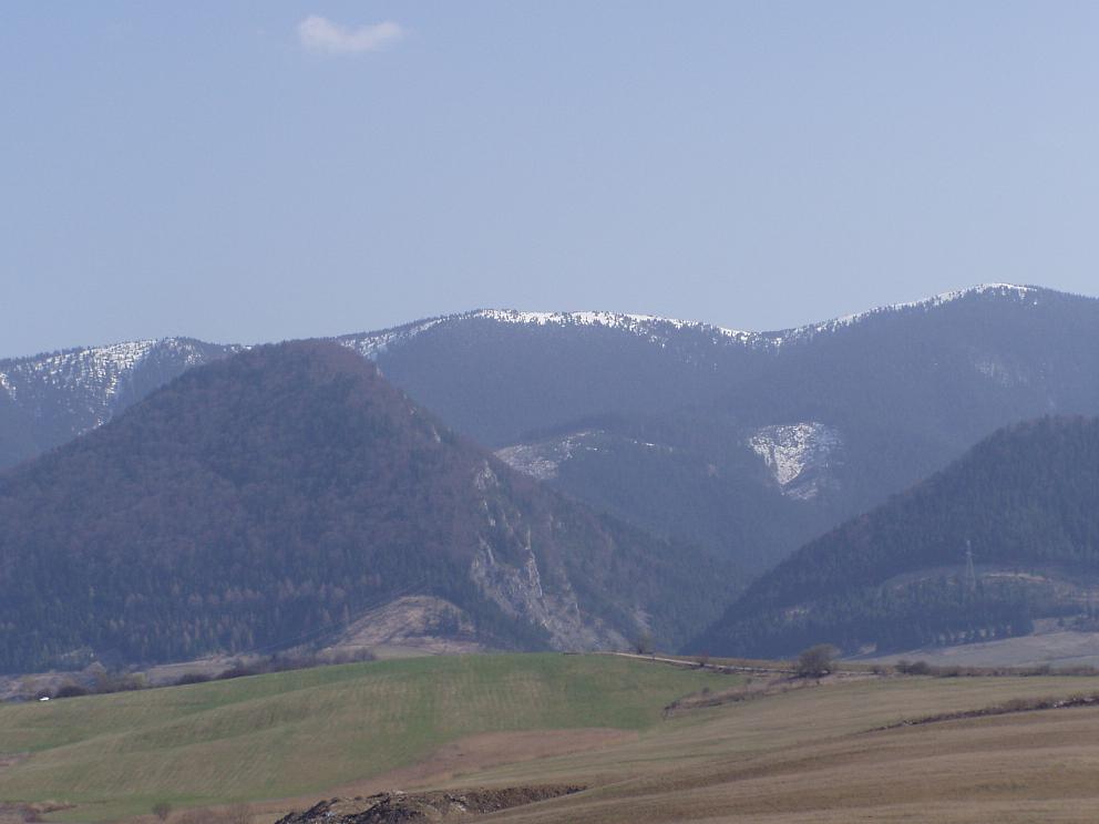 Pohľad na Višňovskú dolinu od letiska.